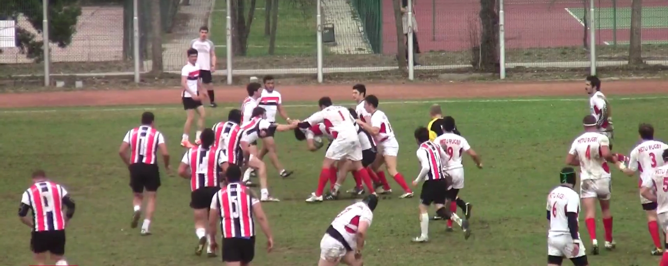 ODTÜ Ragbi ve Samsun 1919 Ragbi takımları arasında 9 Mart 2014 tarihinde gerçekleşen mücadeleden bir enstantane.